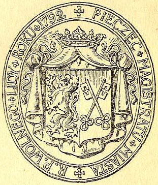 Беларуская (тарашкевіца): Ліда (Lida). Пячаць з гербам места